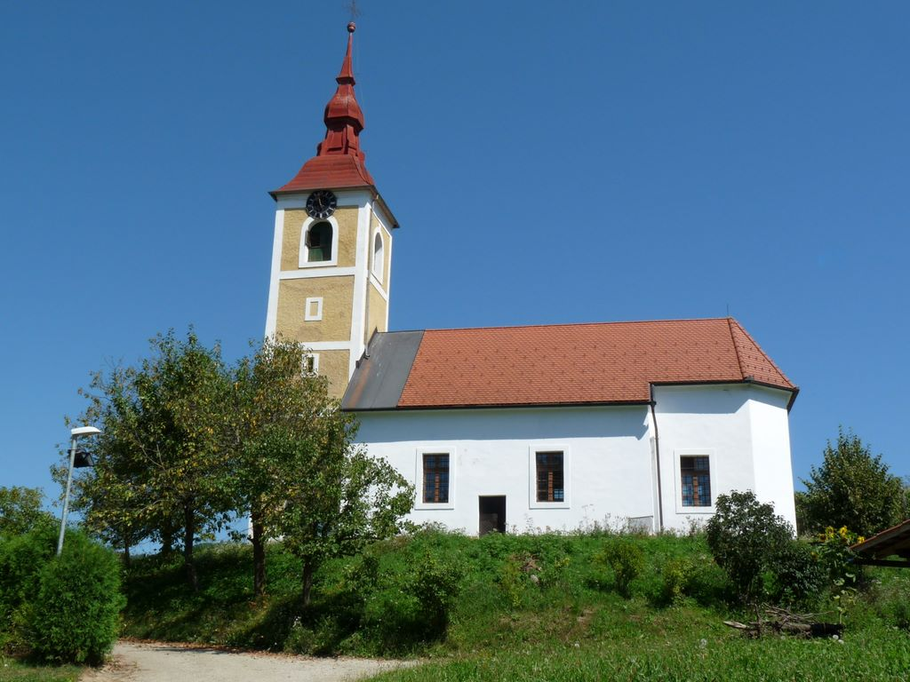 Sveta Lucija na Senušah